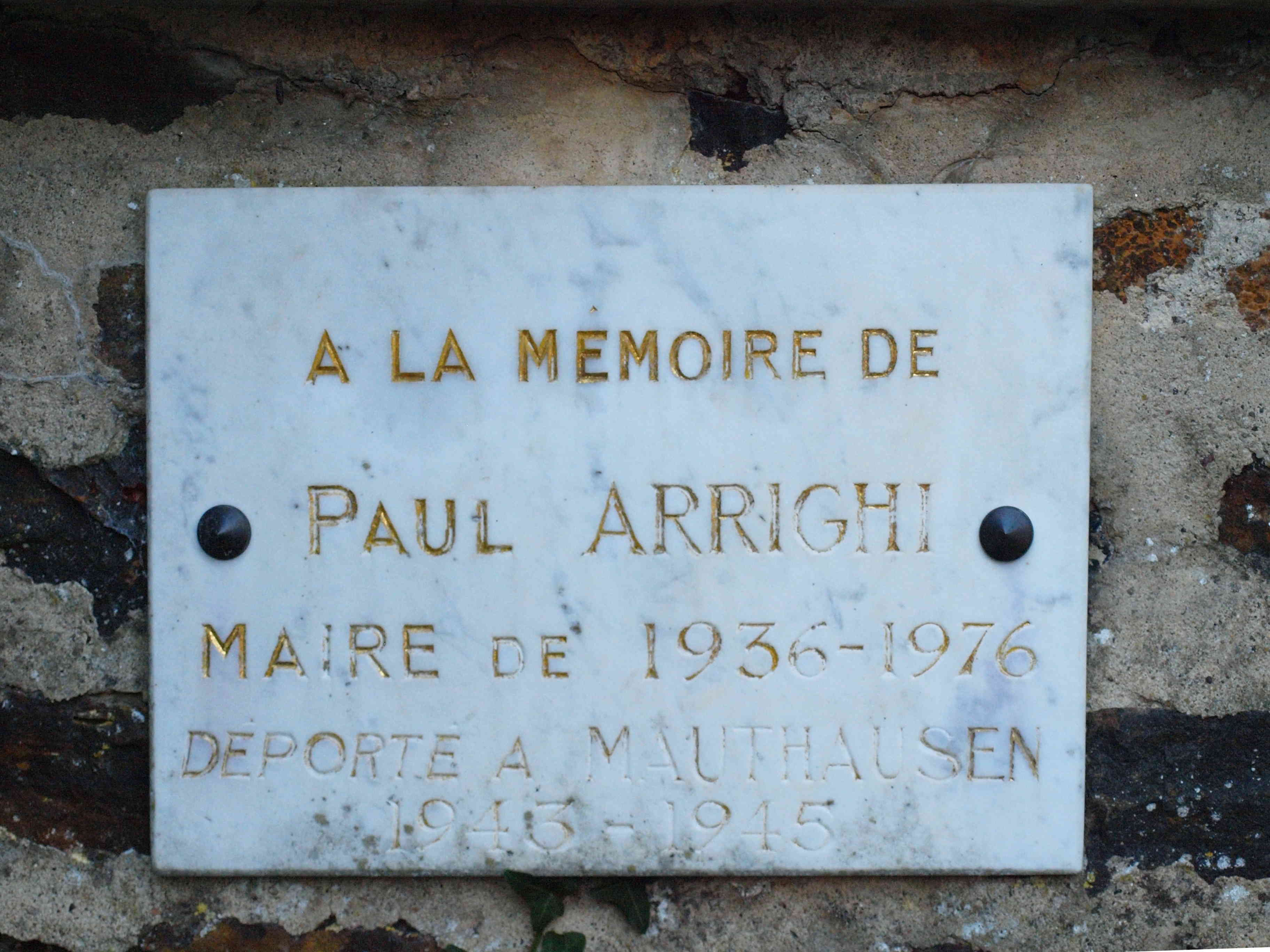 Moulins-sur-Ouanne (Yonne, France), plaque commémorative au maire de la commune de 1936 à 1976.